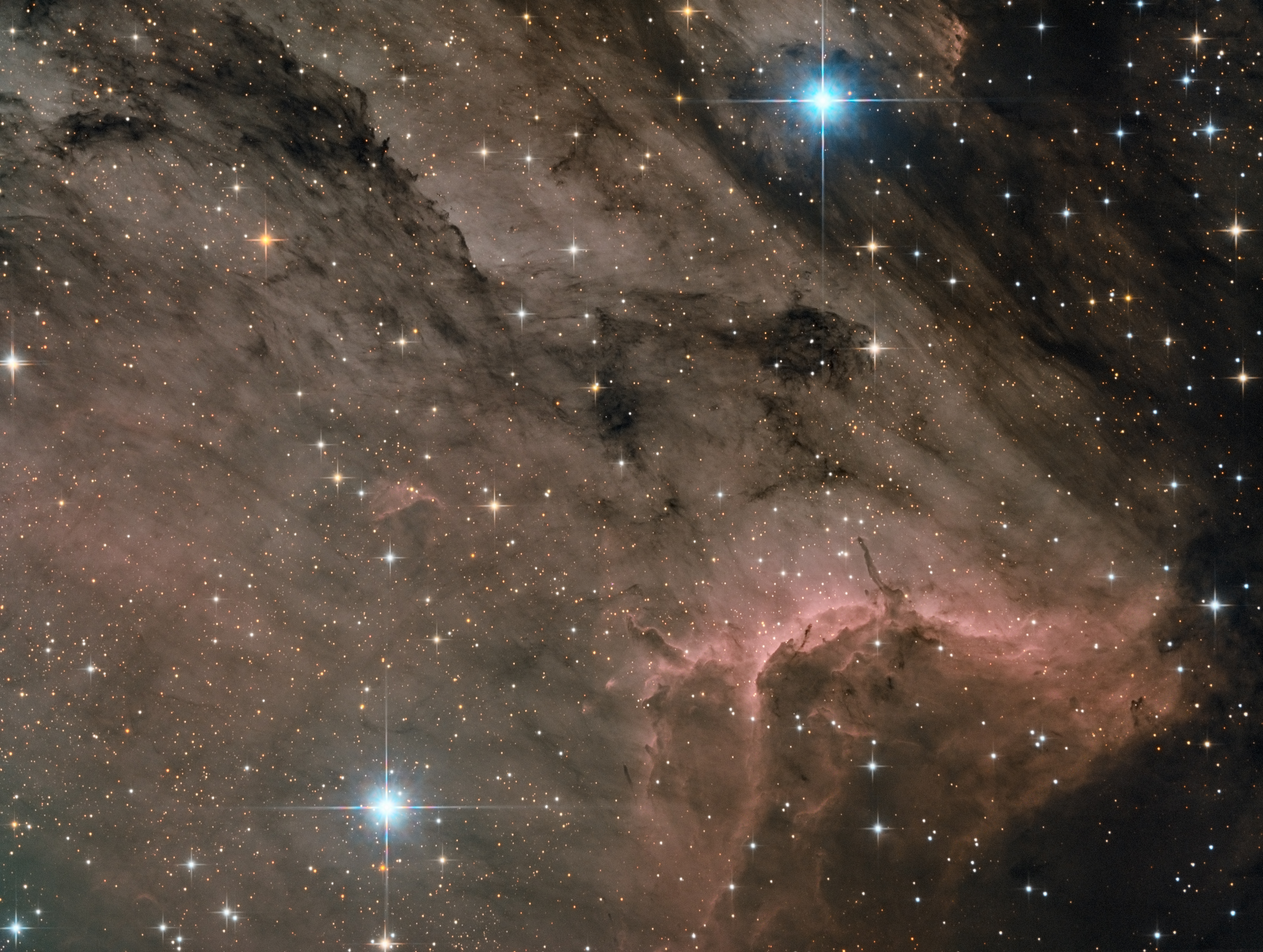 detail na mlhovin IC5070. pořízeno amatérským dalekohledem.